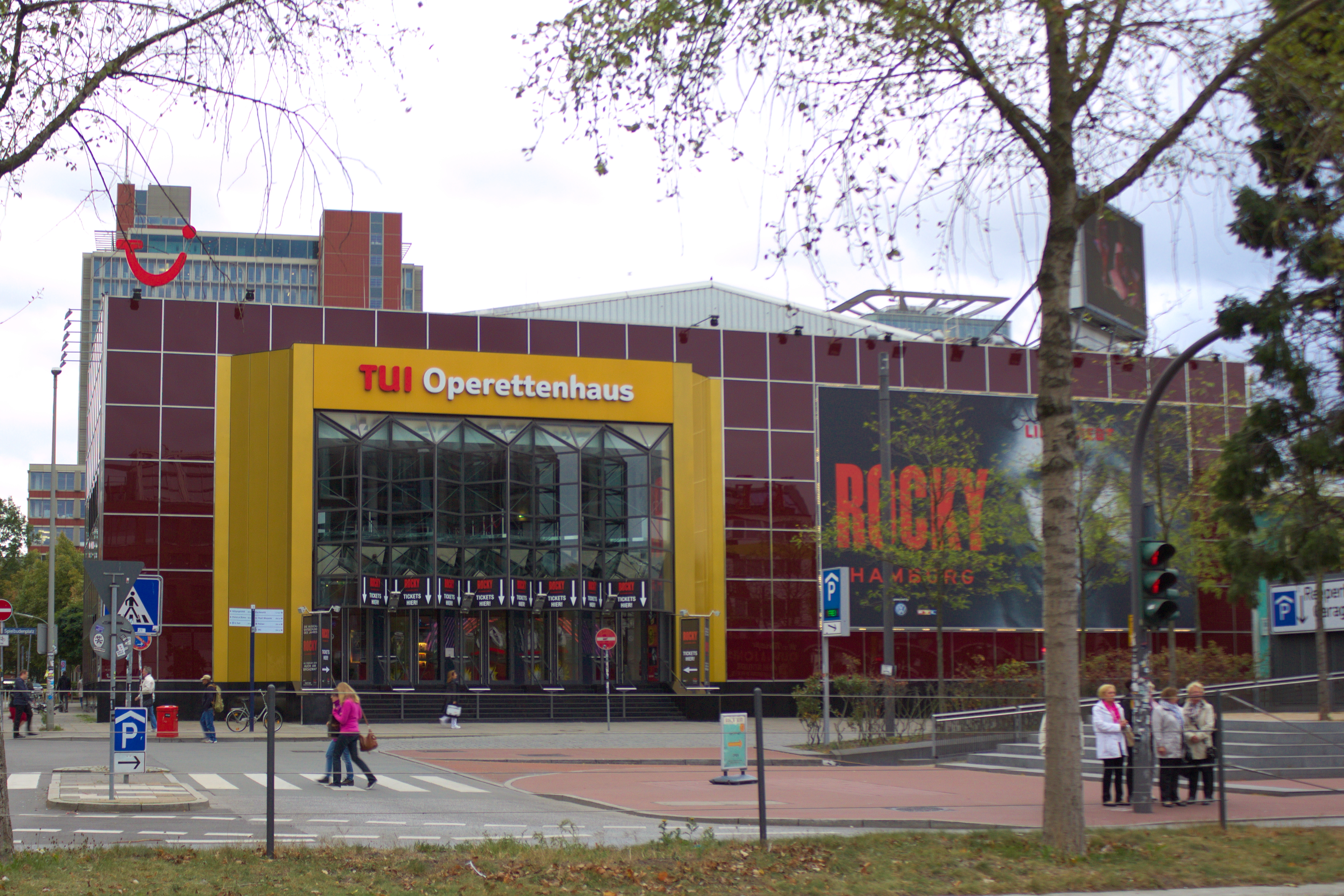 Hamburg